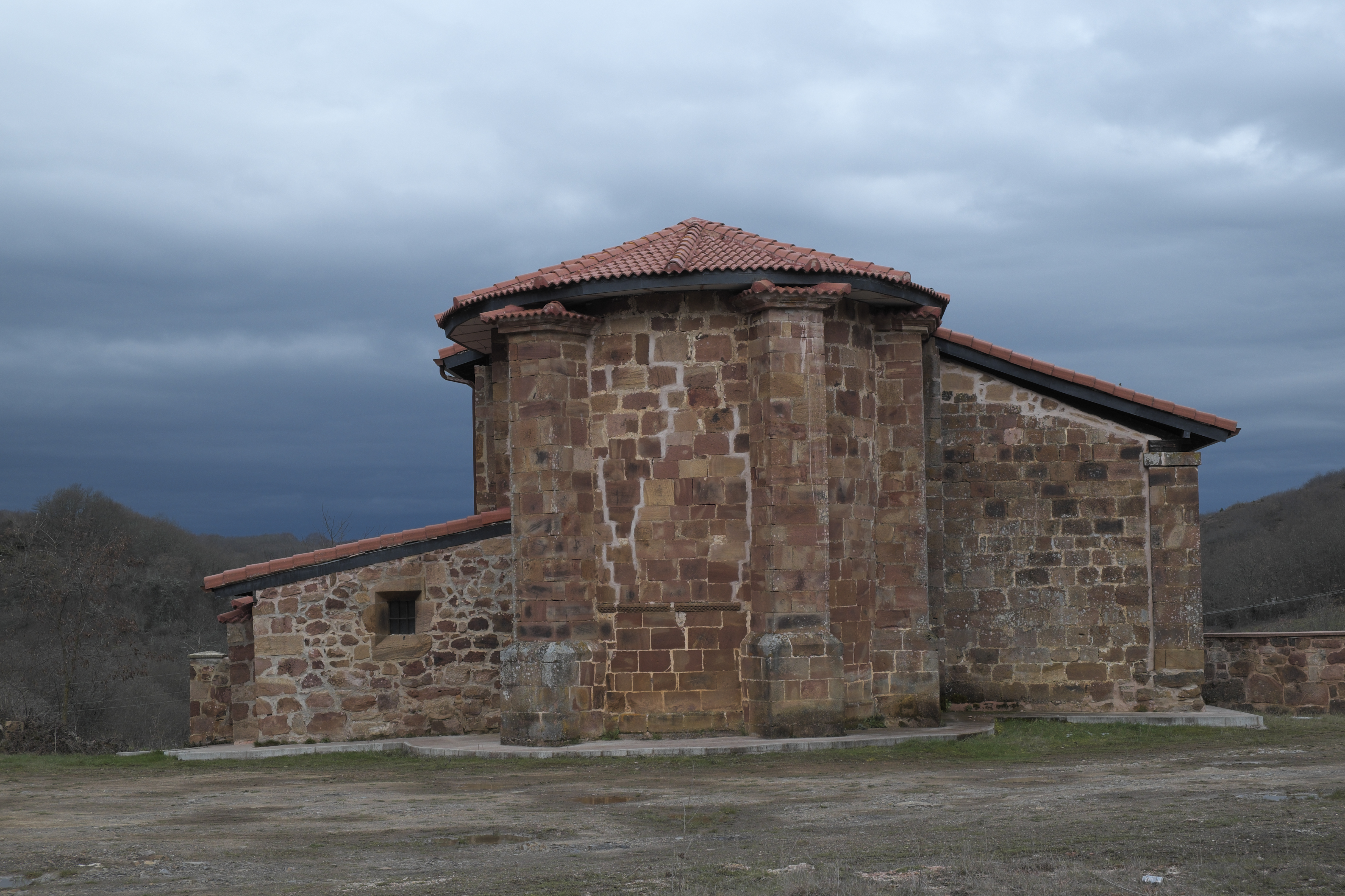 Kirche Nuestra Señora de la Asunción (Mariä Himmelfahrt) in Alarcia, einem Ort in der Gemeinde Rábanos in der Provinz Burgos (Kastilien-León/Spanien)